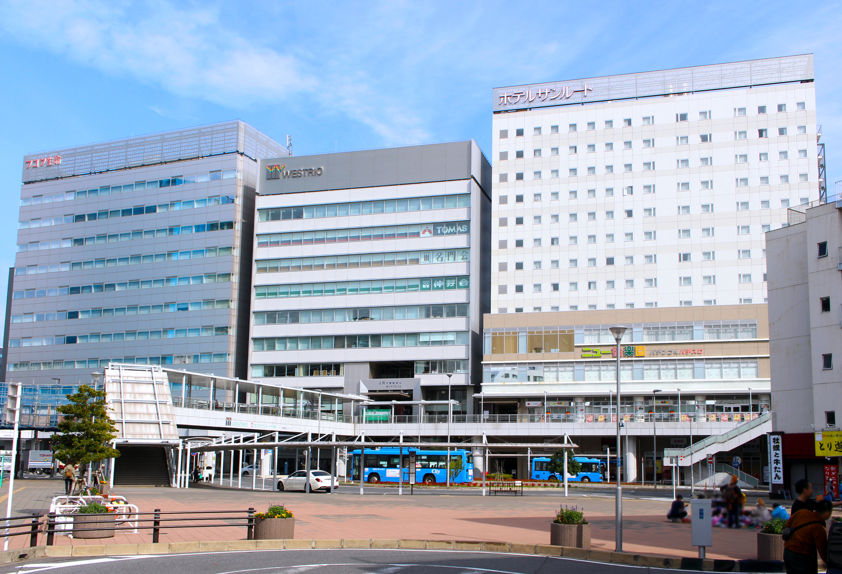 千葉駅西口 WESTRIO